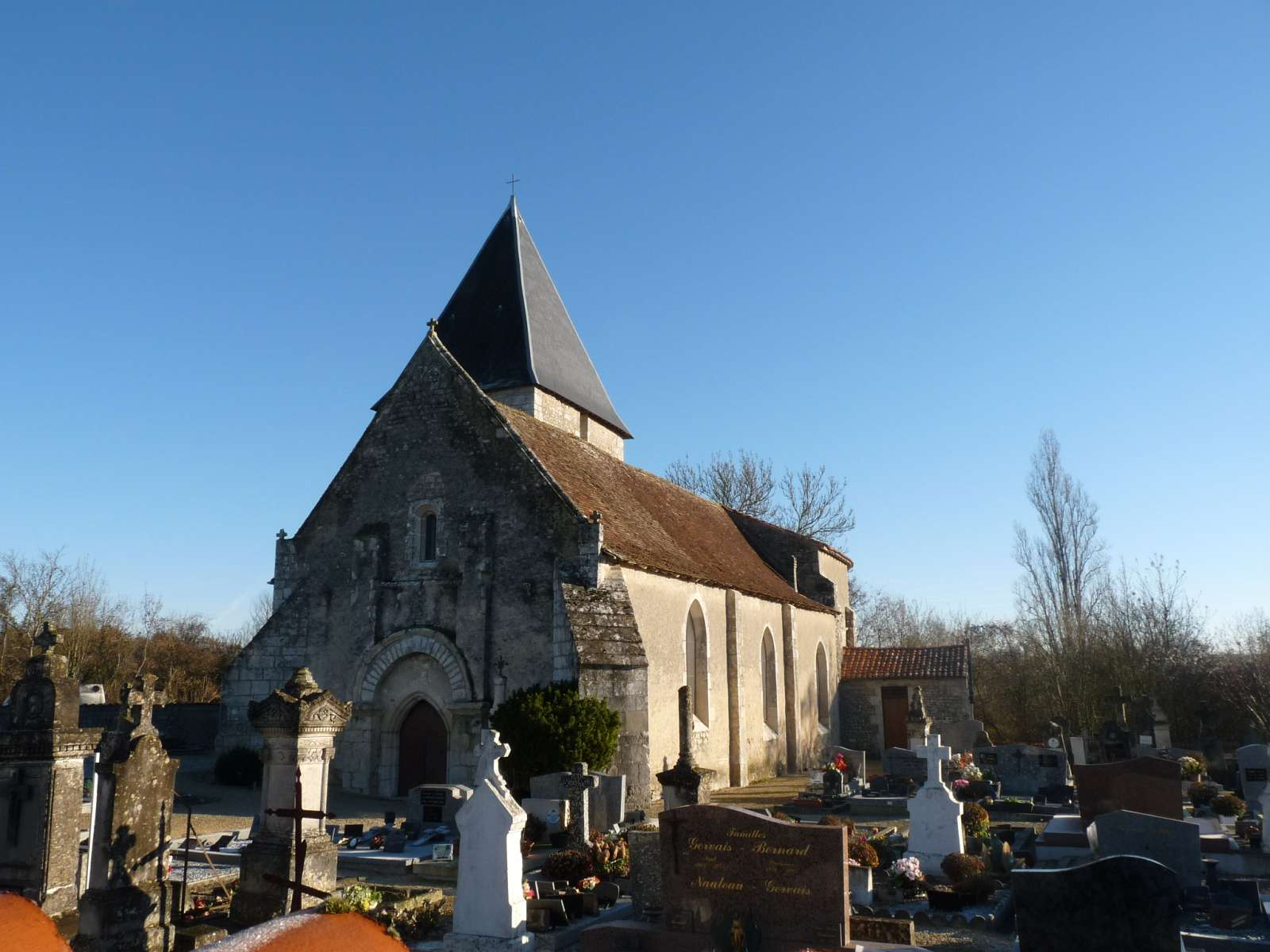 église de Fontenille, Charente, France